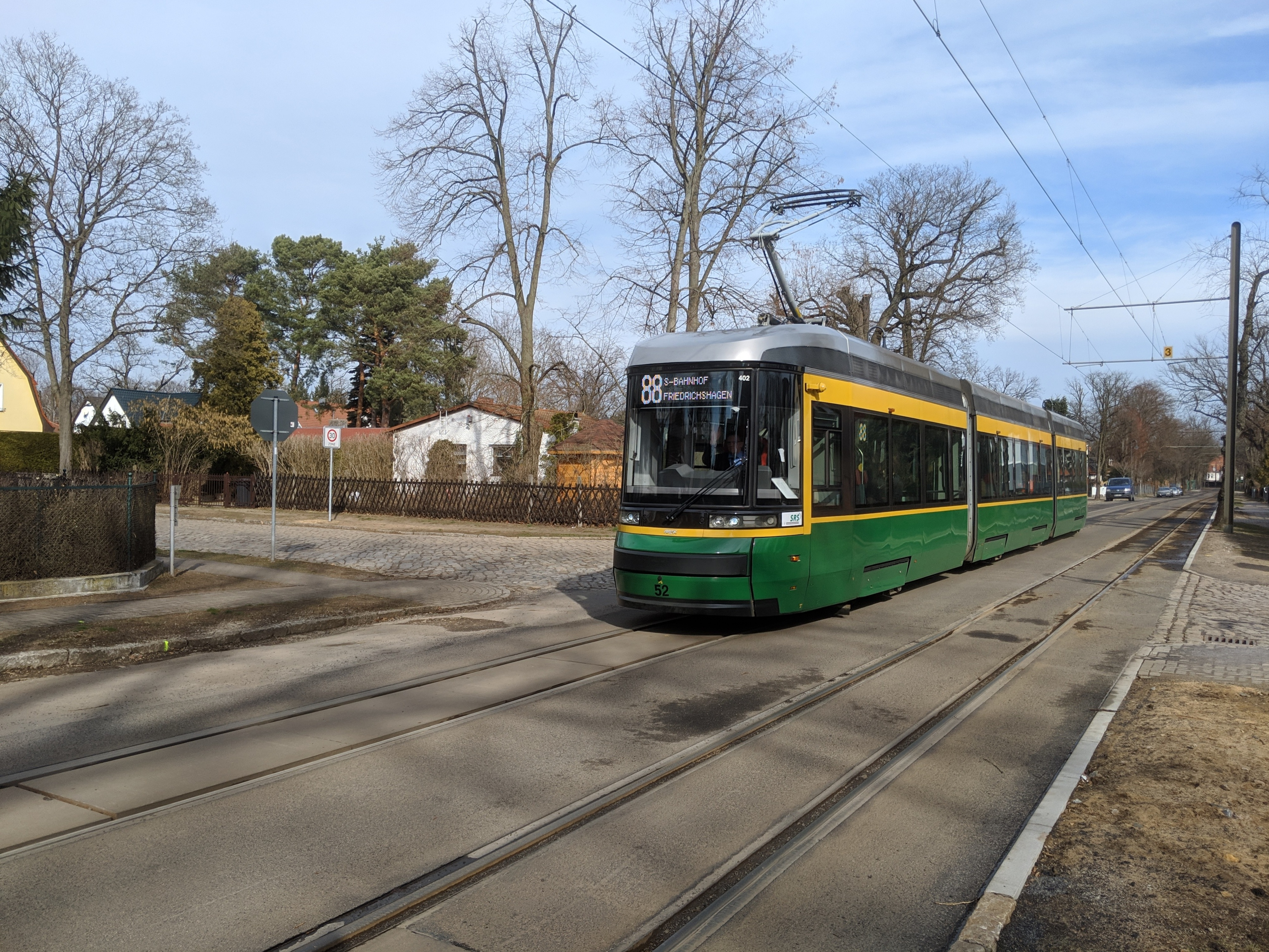 Smartartic bei der Schöneiche-Rüdersdorfer Straßenbahn